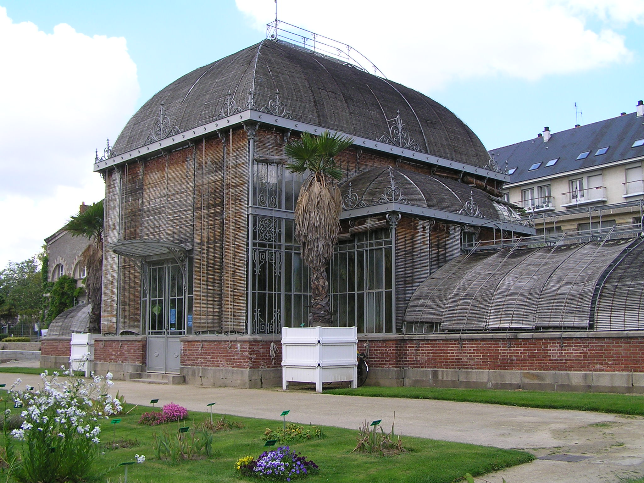 jardin botanique de Nantes